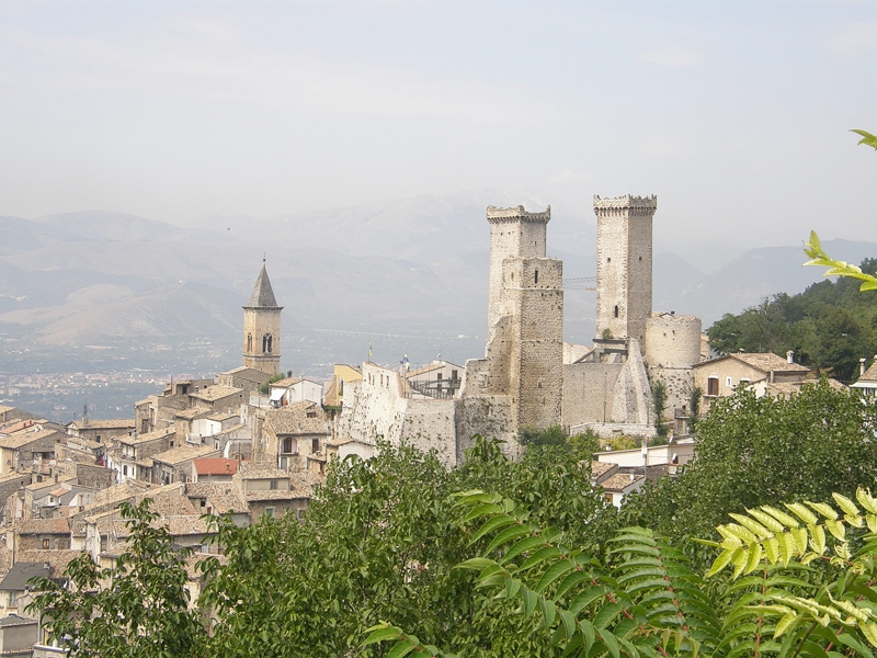 Pacentro